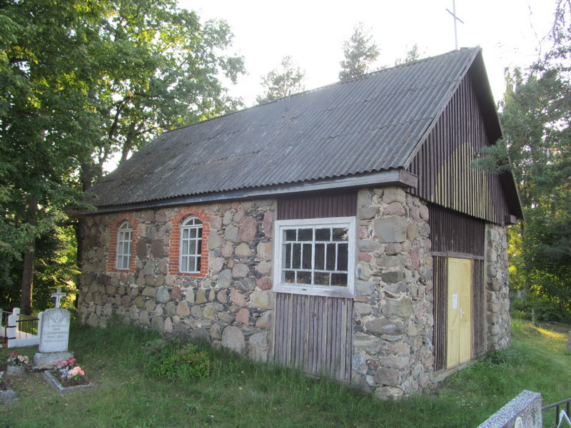 Нурвянцы. Капліца Святога Вінцэнта на могілках